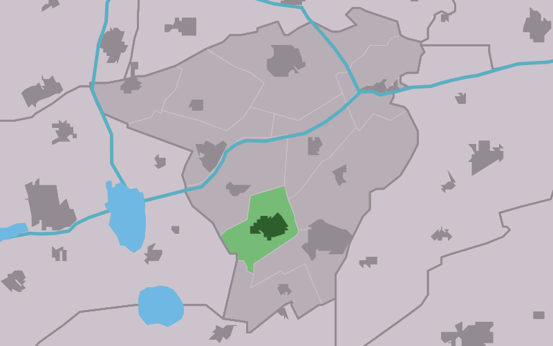 Kaartsje fan himrik fan De Harkema